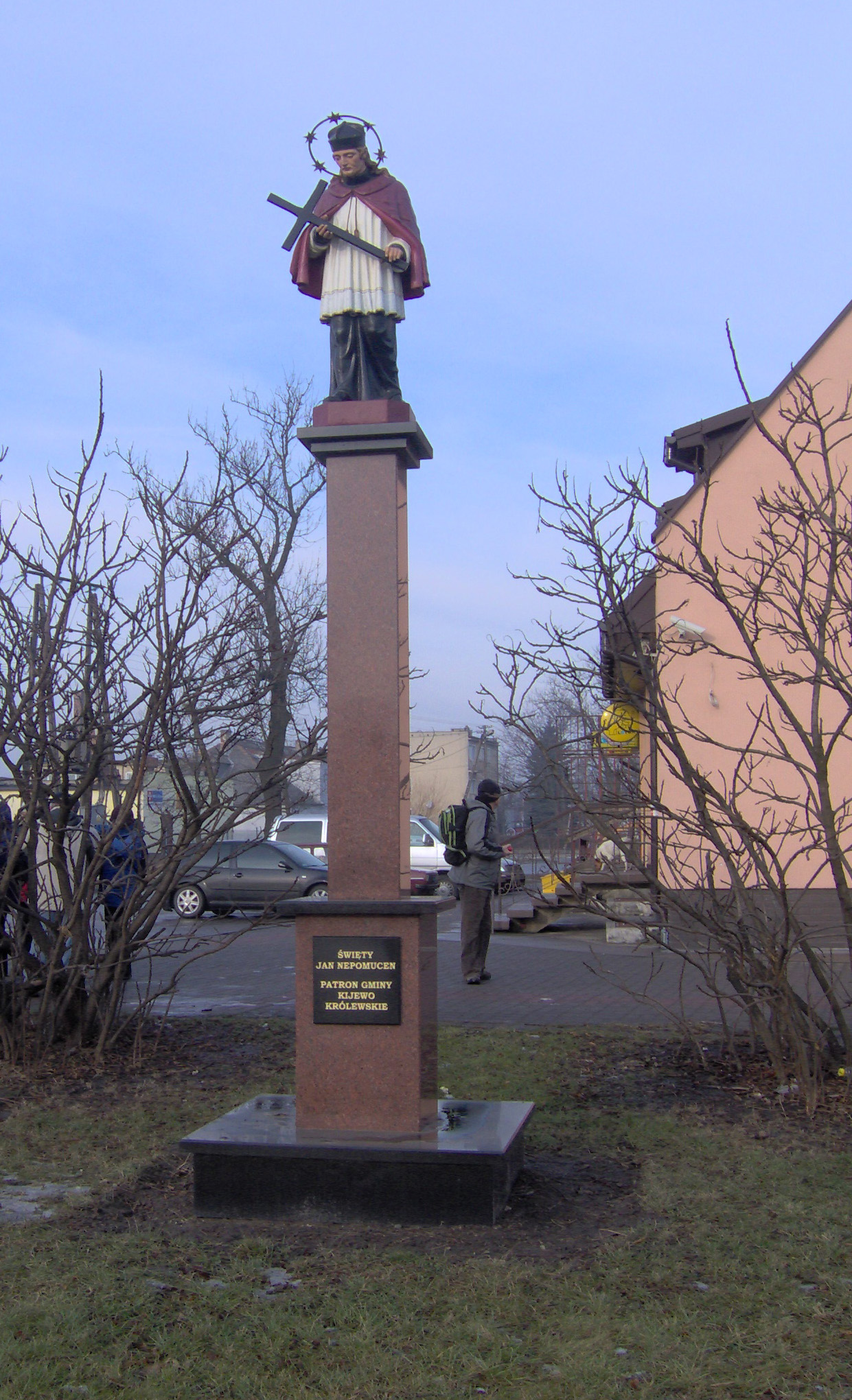 Figure of Saint John Nepomucene in Kijewo Królewskie